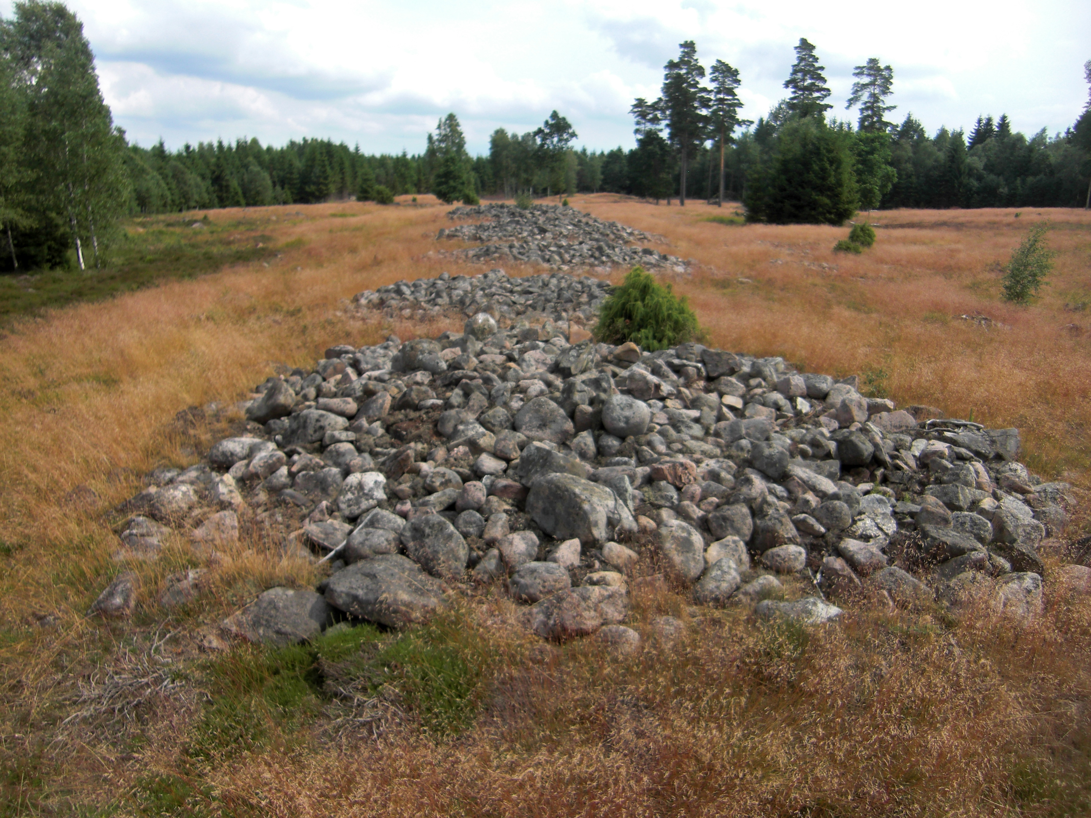 Rösen på Orraryds gravfält (Raä-nr Nöbbele 3:1) i Nöbbele socken i Konga härad i Värend, Växjö kommun, Kronobergs län, Småland, Sverige.